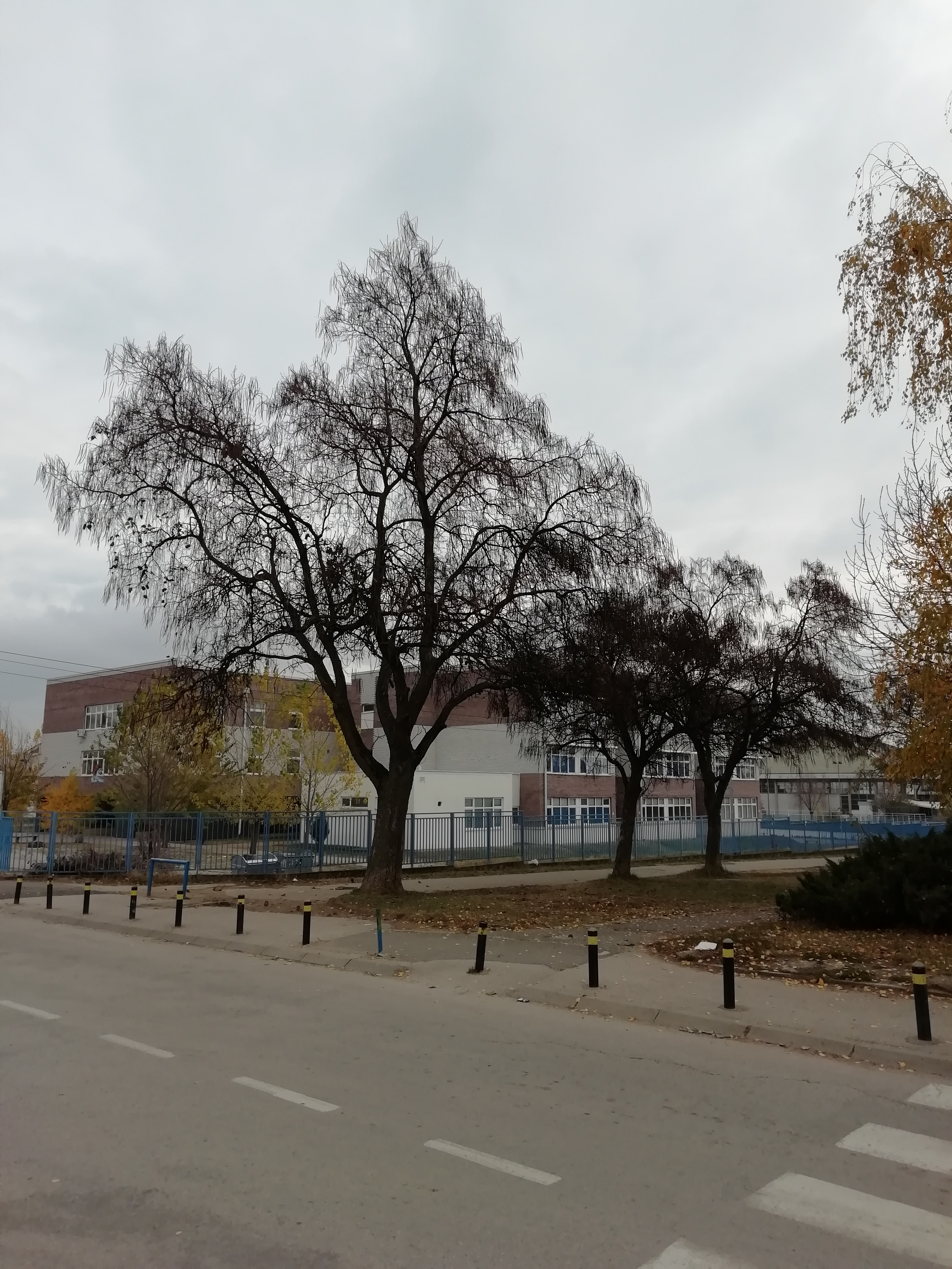 Средња школе- медицинска школа „Др Изабел Емсли Хатон“ и Хемијско-технолошка школа.